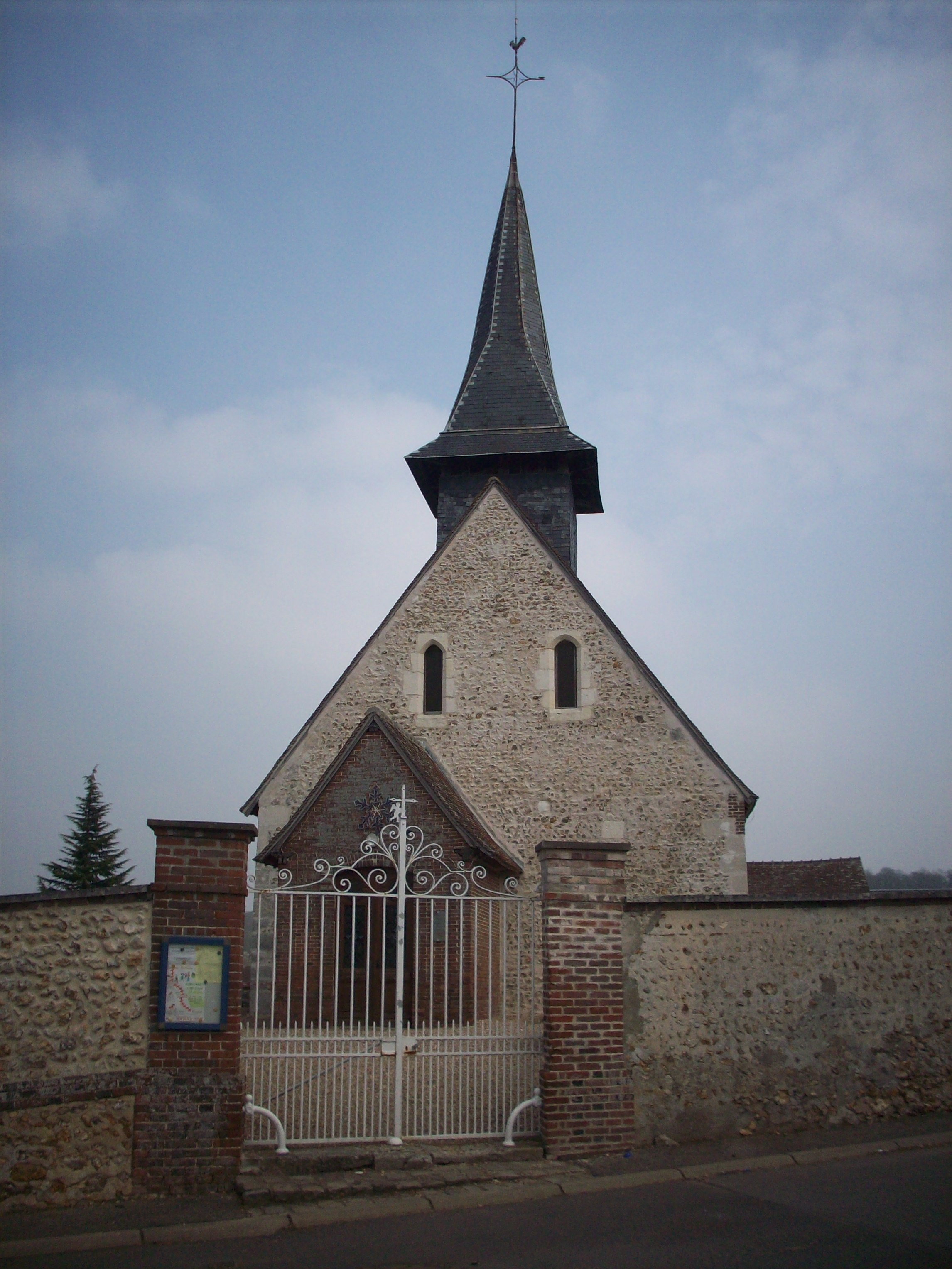 Église Saint-Martin d'Arnières-sur-Iton.